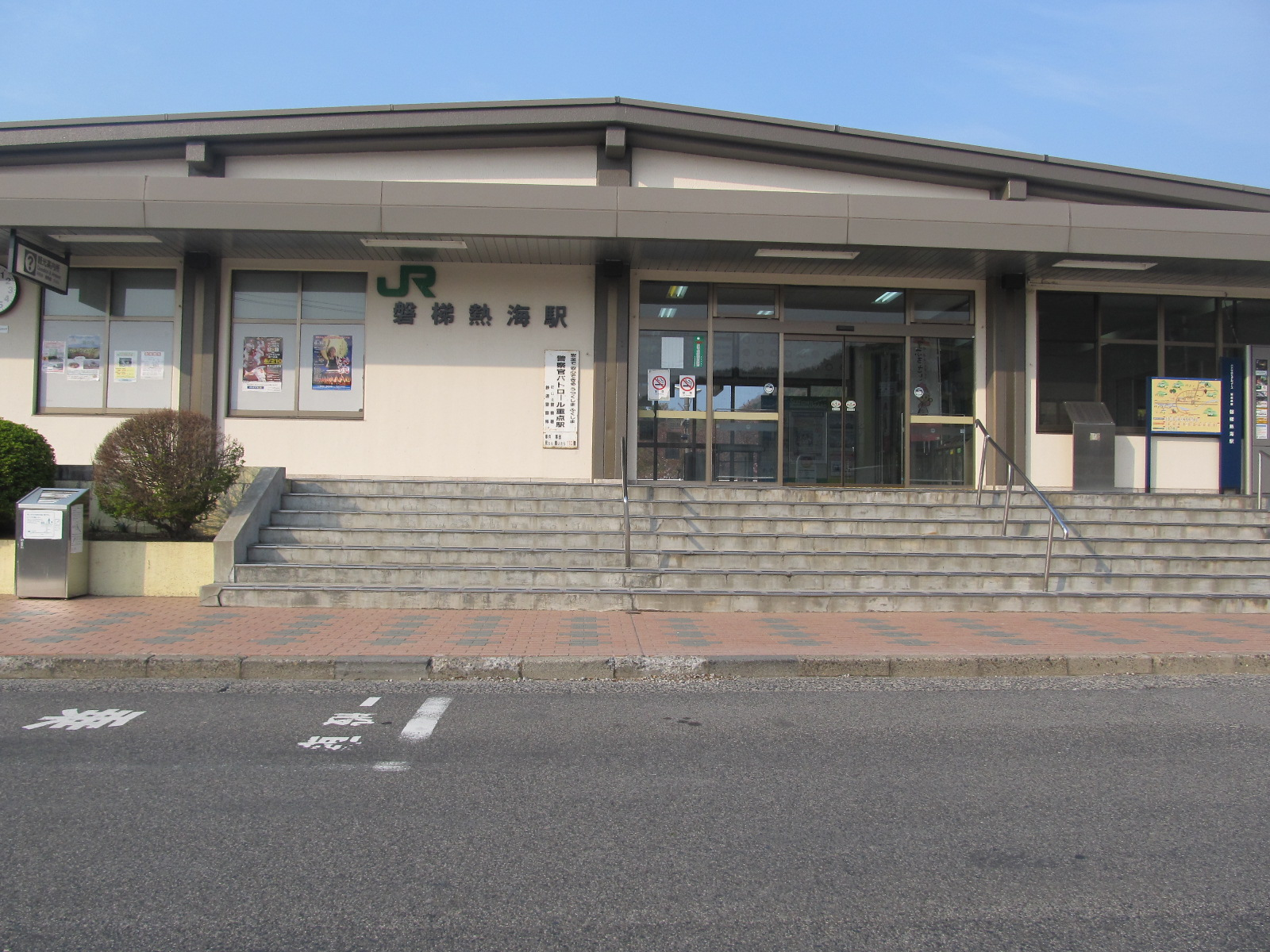 磐梯熱海駅